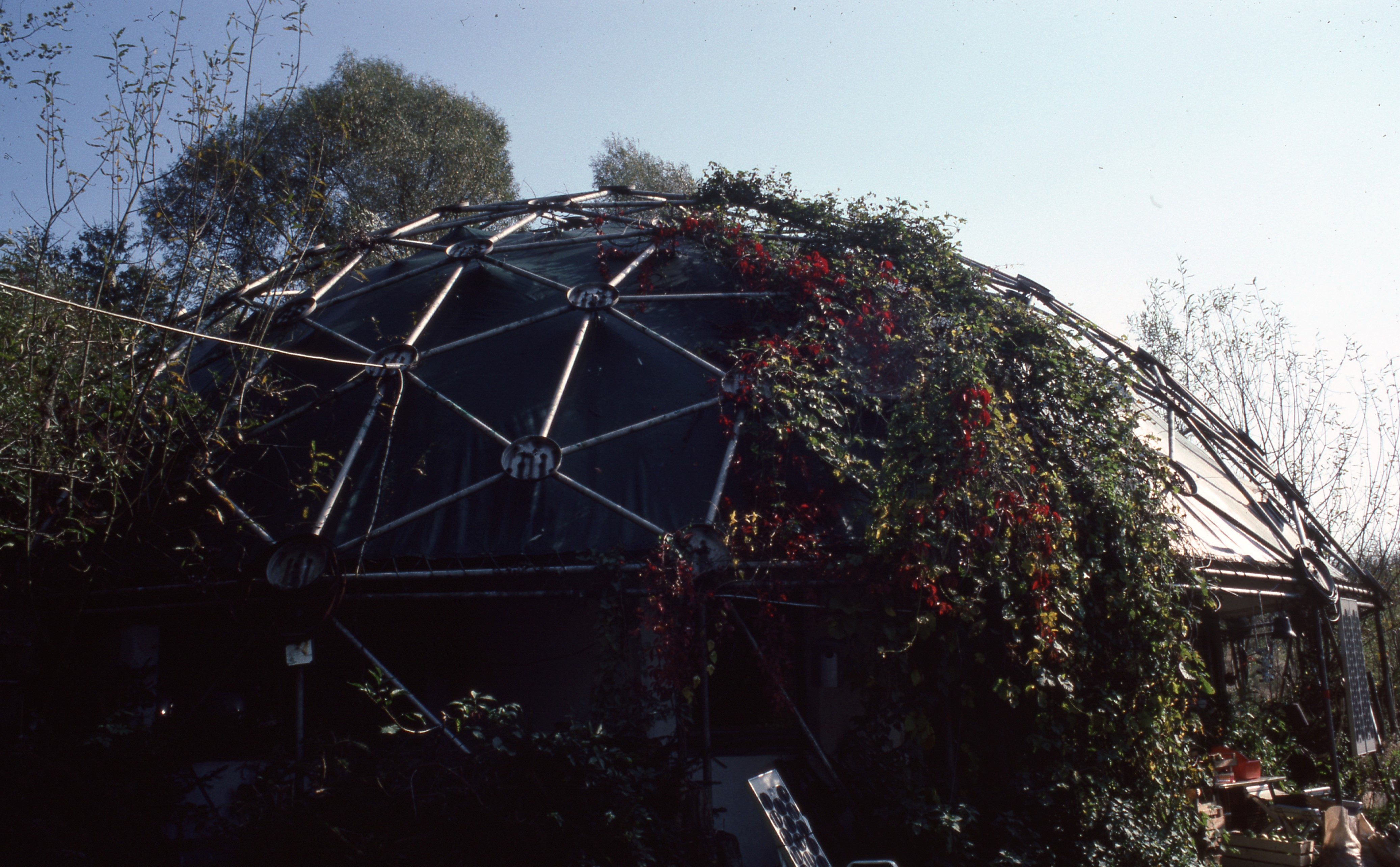 Bioarchitektur